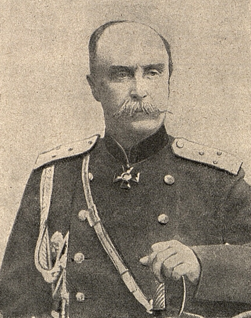 Alexander Kaulbars